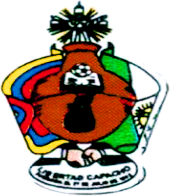 Escudo del municipio Libertad del estado Táchira y de su capital Libertad (Capacho Viejo), en formato PNG. -En proceso de vectorización